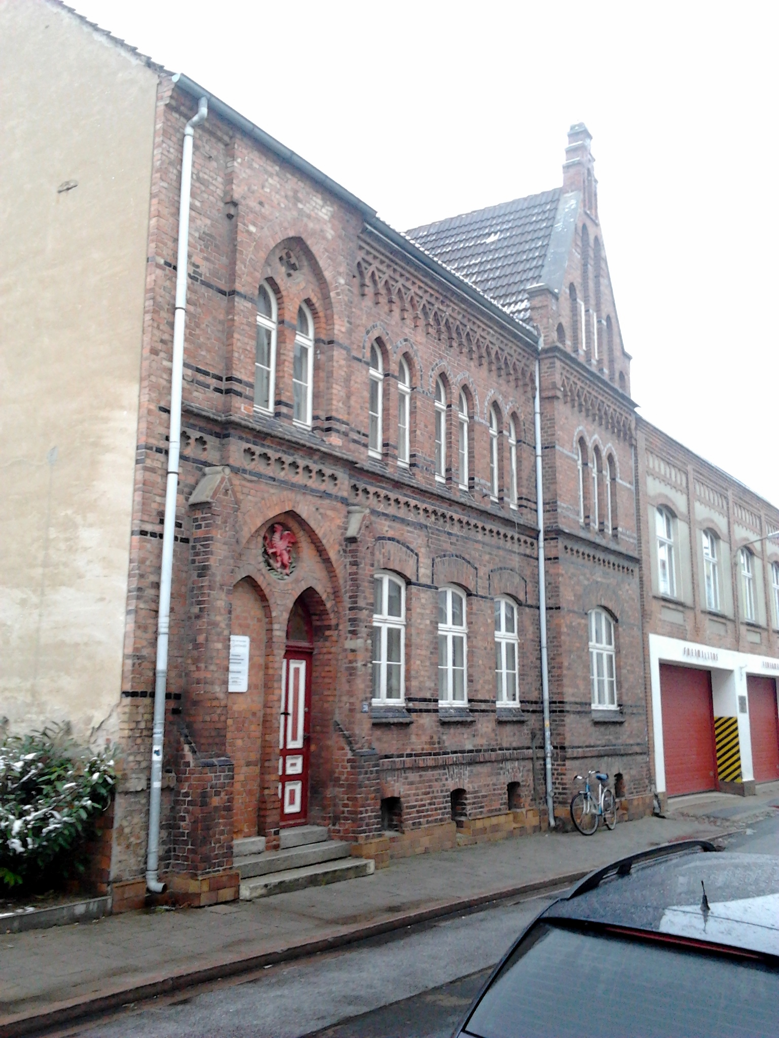 Greifswald, Baderstraße 23/24, Alte Feuerwehr